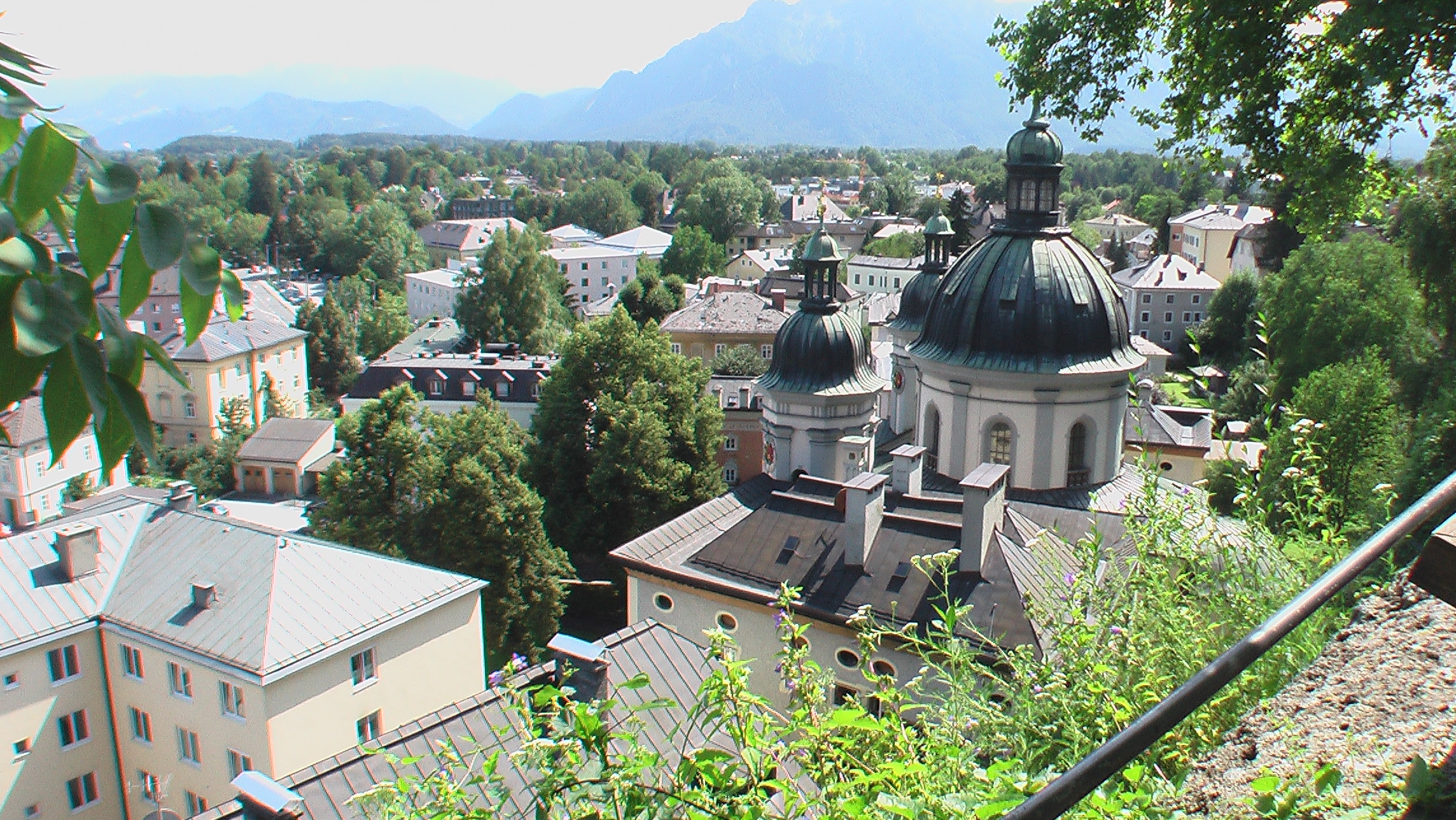 Über den Dächern von Salzburg